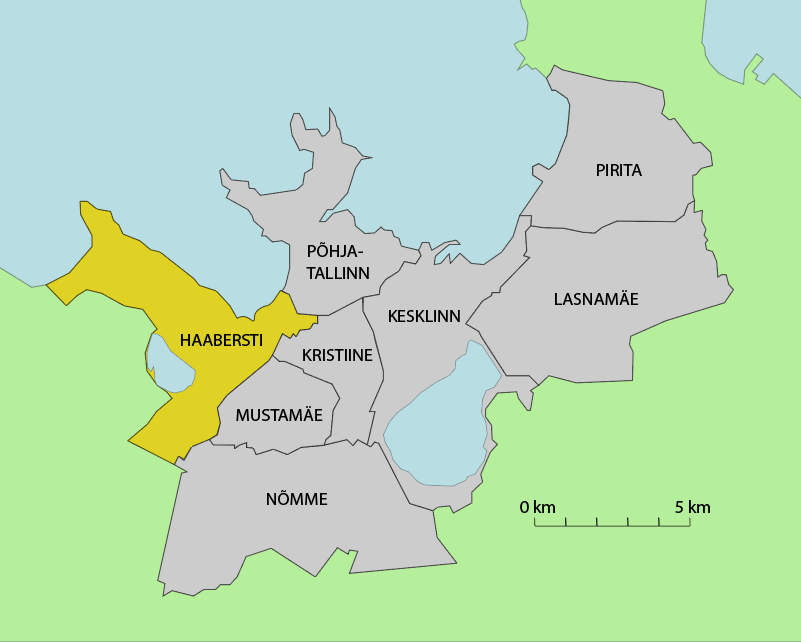 Kaart Haabersti linnaosa paiknemisest Tallinnas